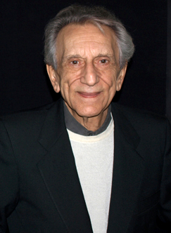 Christine Cristina - il maestro Roberto Herlitzka